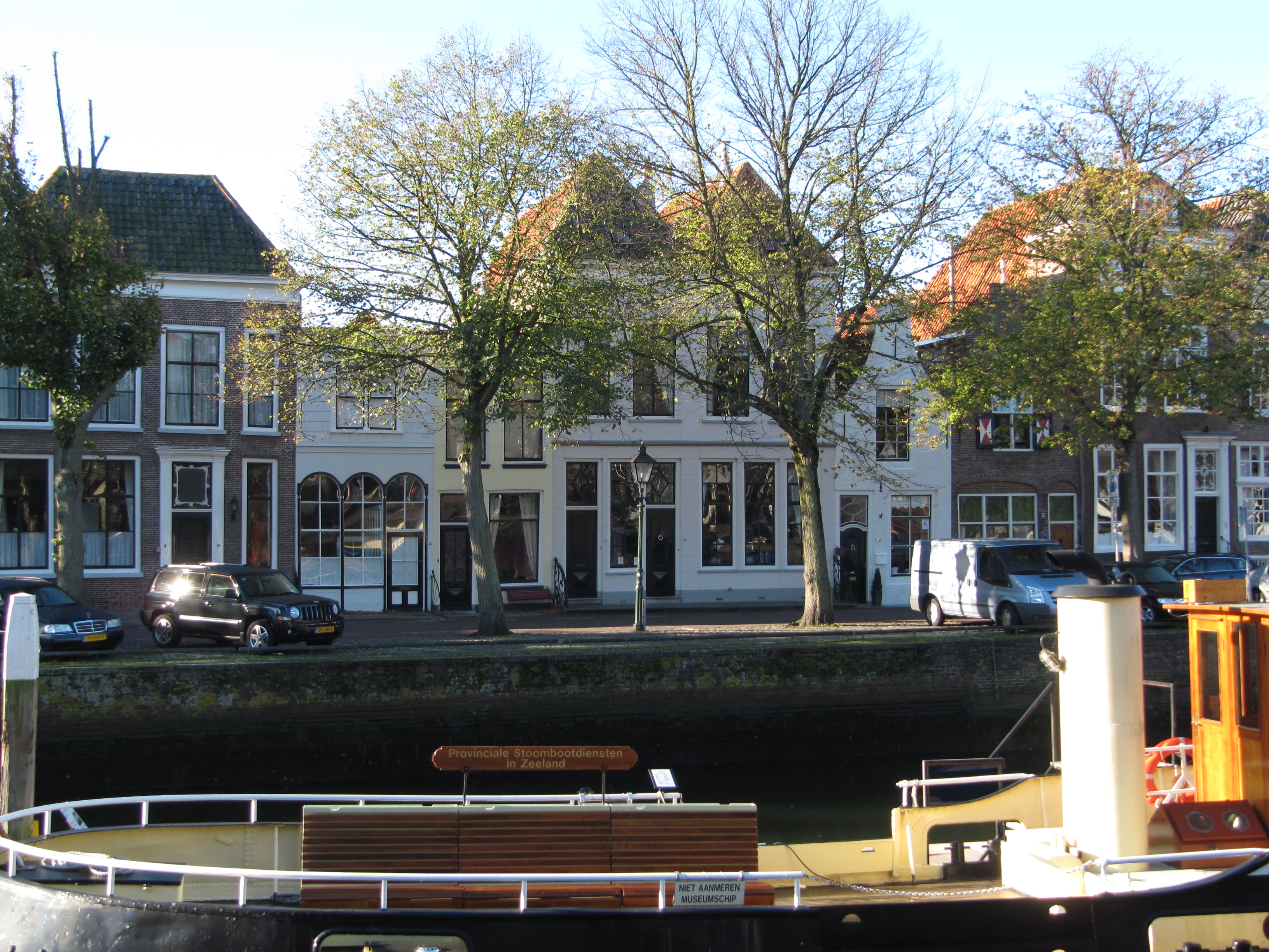 RM40883 Zierikzee - Oude Haven 26-28.jpg